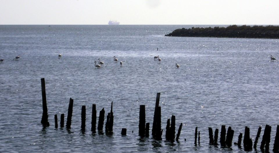 Flamants roses à la Saline de Thyna- Sfax, Tunisie